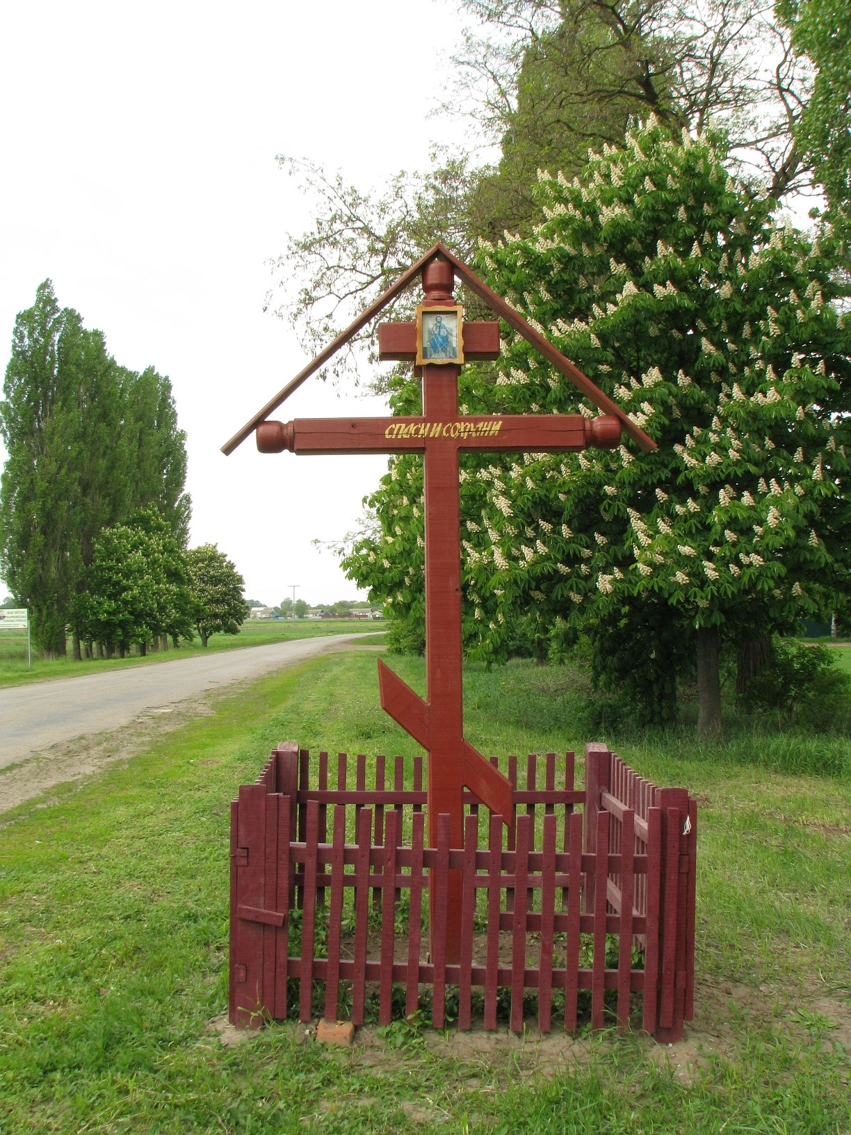 Поклонний хрест. Село Марківці, Бобровицький район, Чернігівська область.